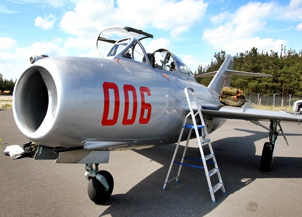 Samolot wojskowy SBLim-2 na lotnisku Mieleckim. Rok produkcji 1953 w WSK Mielec.